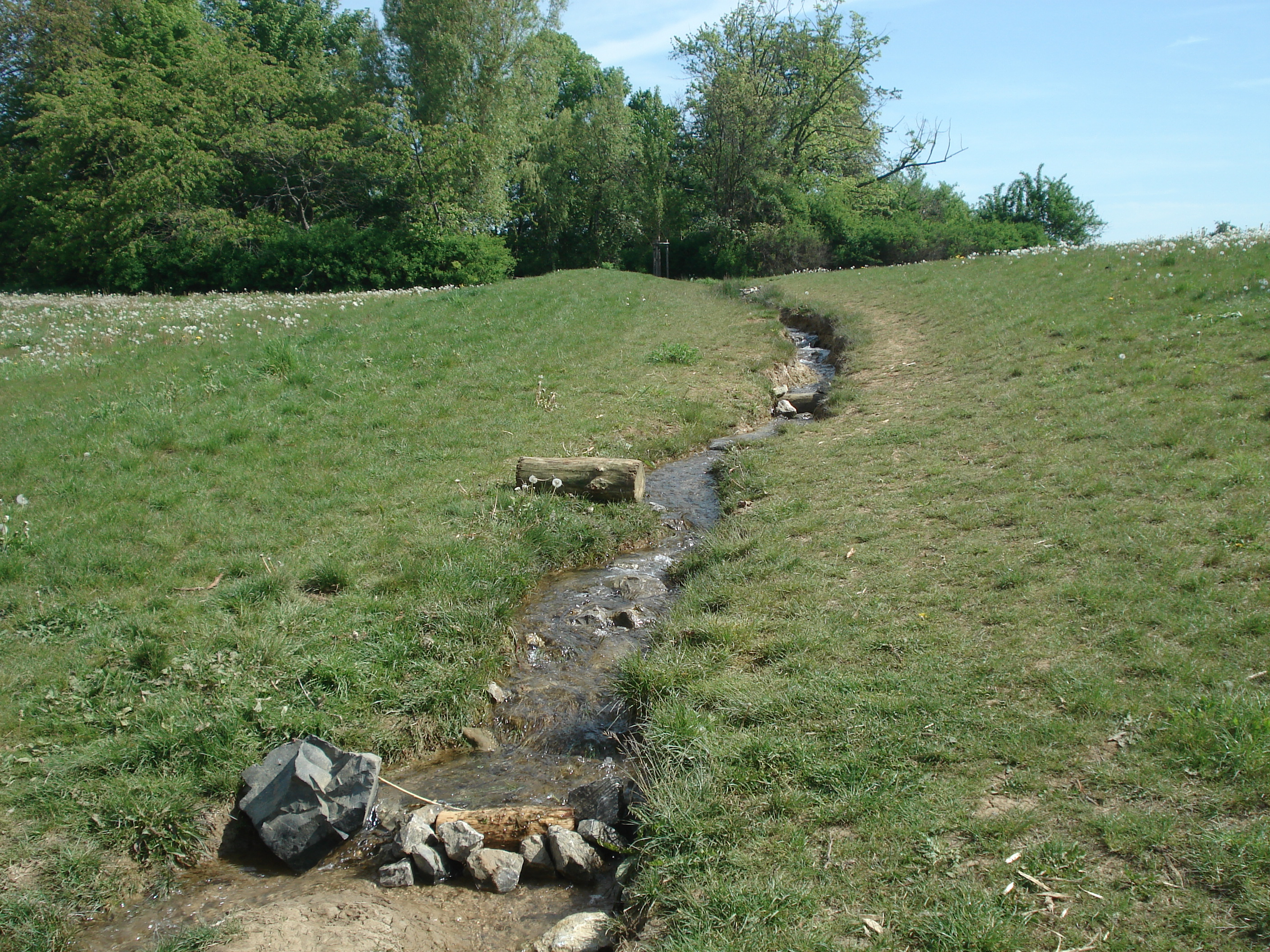 Der fließende, künstliche Abfluss der Thomasquelle